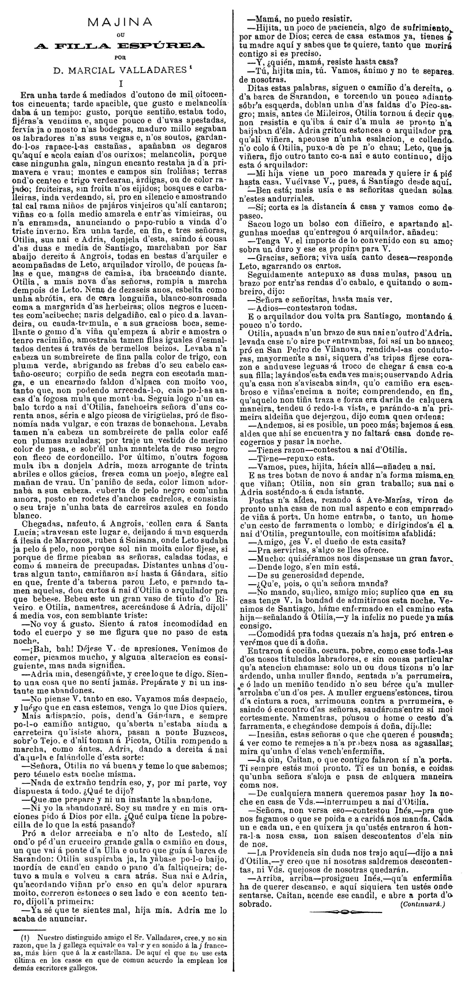 Majina ou a filla espúrea